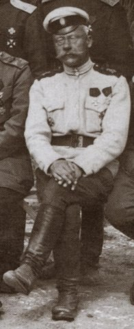 Генерал-майор Сергей Михеевич Икишев в 1922 году в Великом Тырнове.